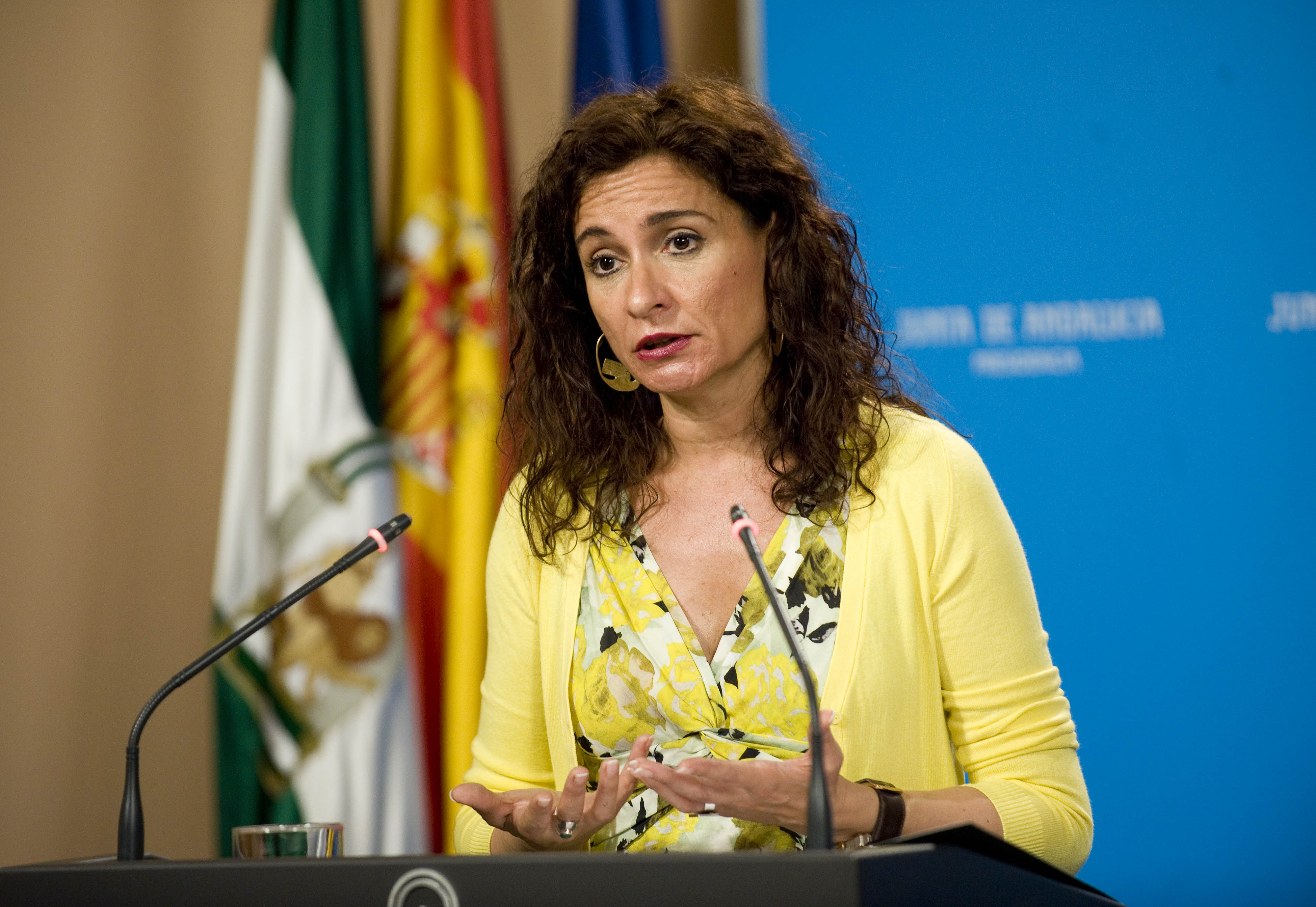 María Jesús Montero Cuadrado